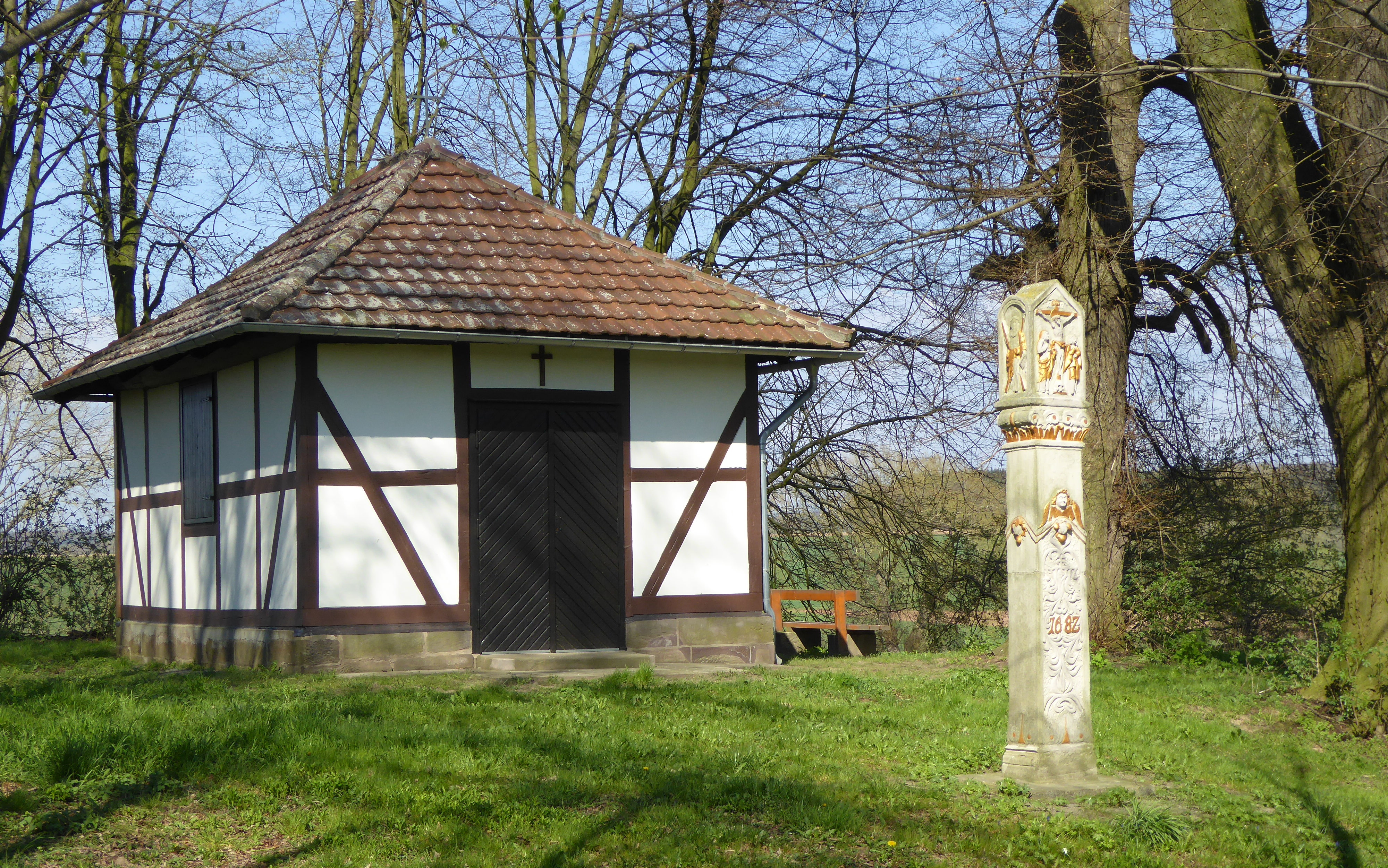 Dodenhäuser Kapelle mit Bildstock an der Wüstung Dodenhusen, Flecken Gieboldehausen, Südniedersachsen. Fachwerkkapelle erbaut 1849, Bildstock bezeichnet 1682 (restauriert 1985/86).